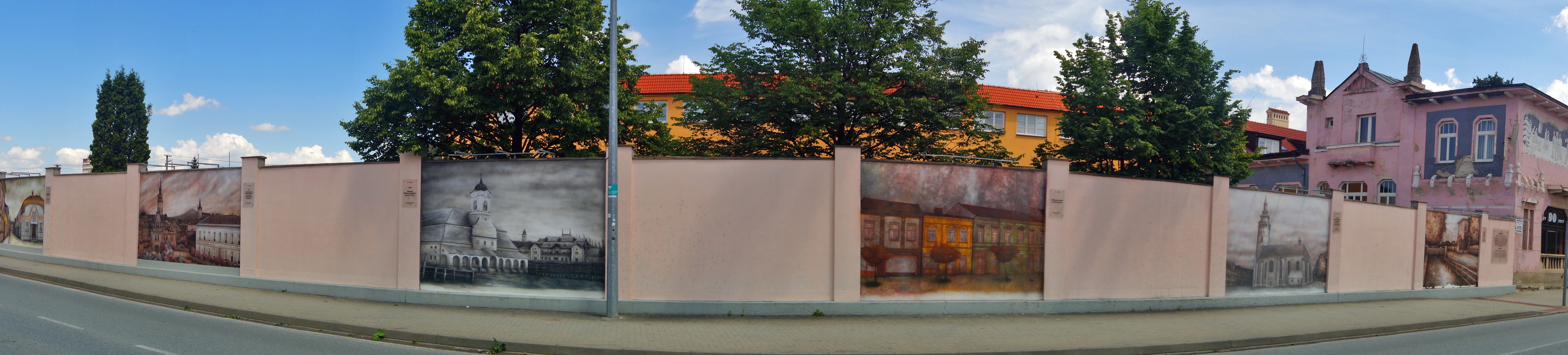 Exteriérová galéria na Okružnej ulici